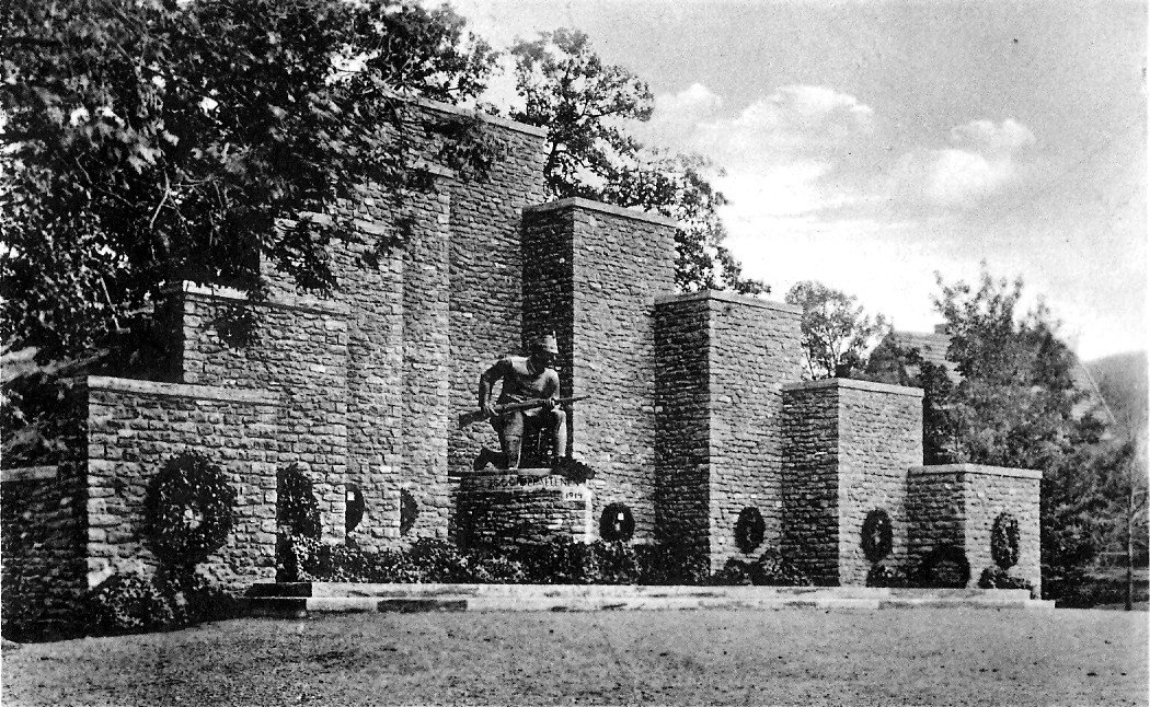 Gefallenen-Ehrenmal der Goslarer Jäger in Goslar, Thomaswall; errichtet 1926